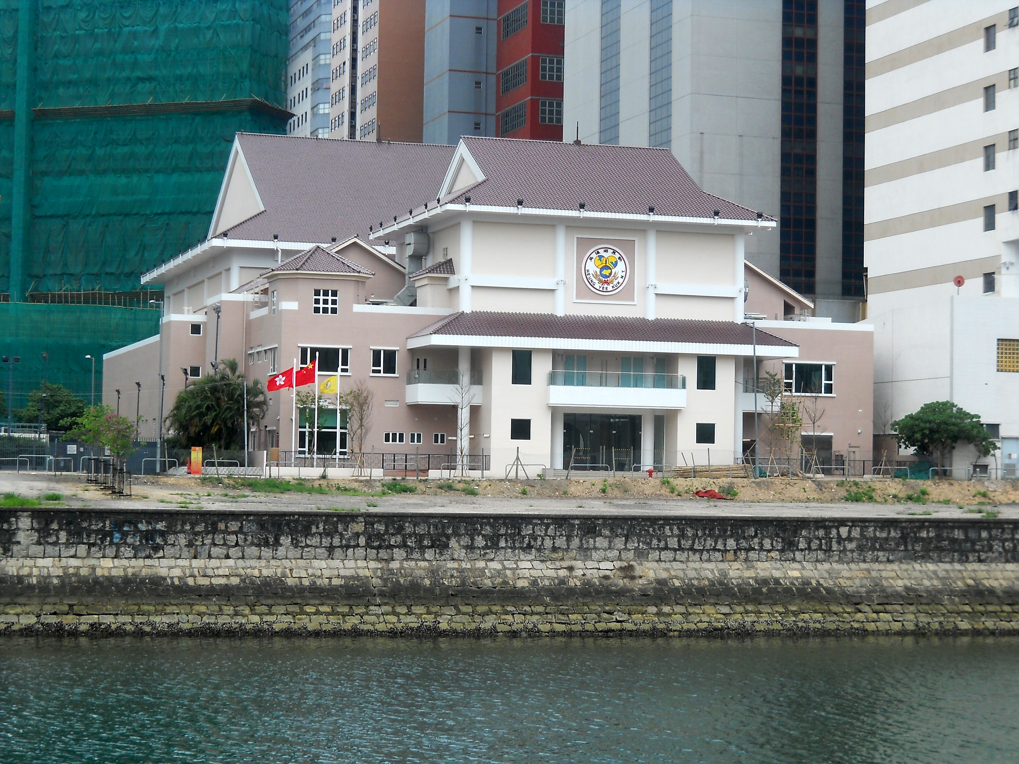 中文（香港）: 新界鄉議局大樓外貌